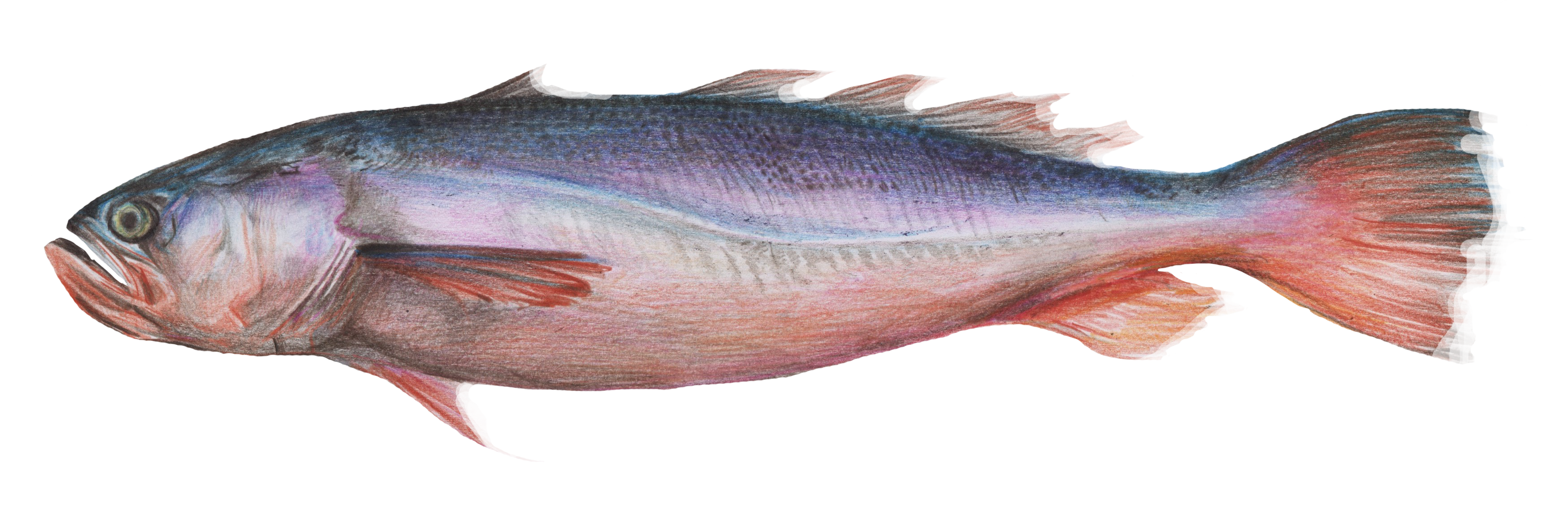 Desenho à lápis da pescada gó (Macrodon ancylodon). Desenho originalmente comissionado pela ONG Rare Brazil (